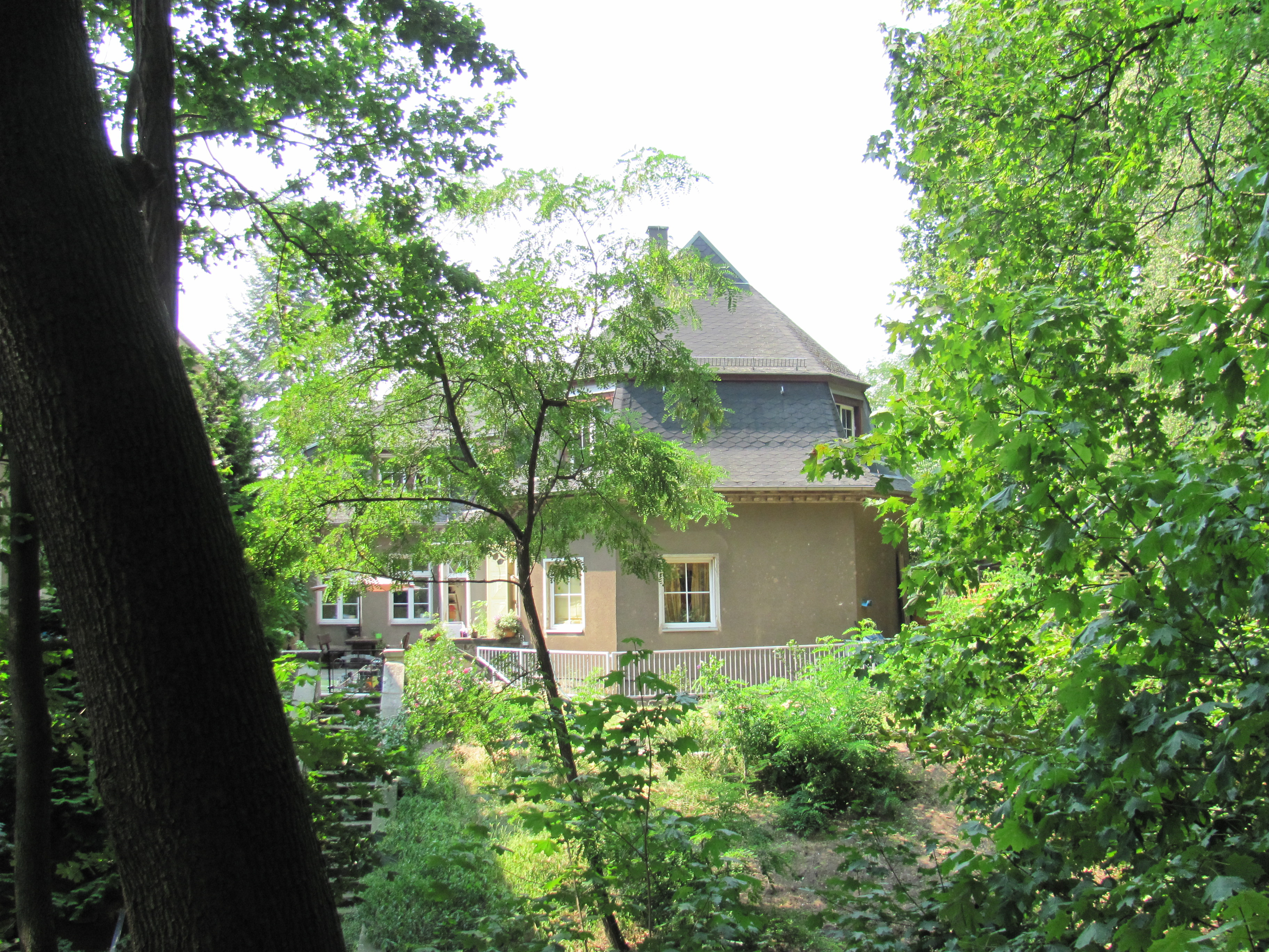 Radebeul-Oberlößnitz, Villa Wach, Wirtschaftsgebäude auf der nördlichen Hangseite